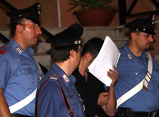 Arresto da parte dei Carabinieri